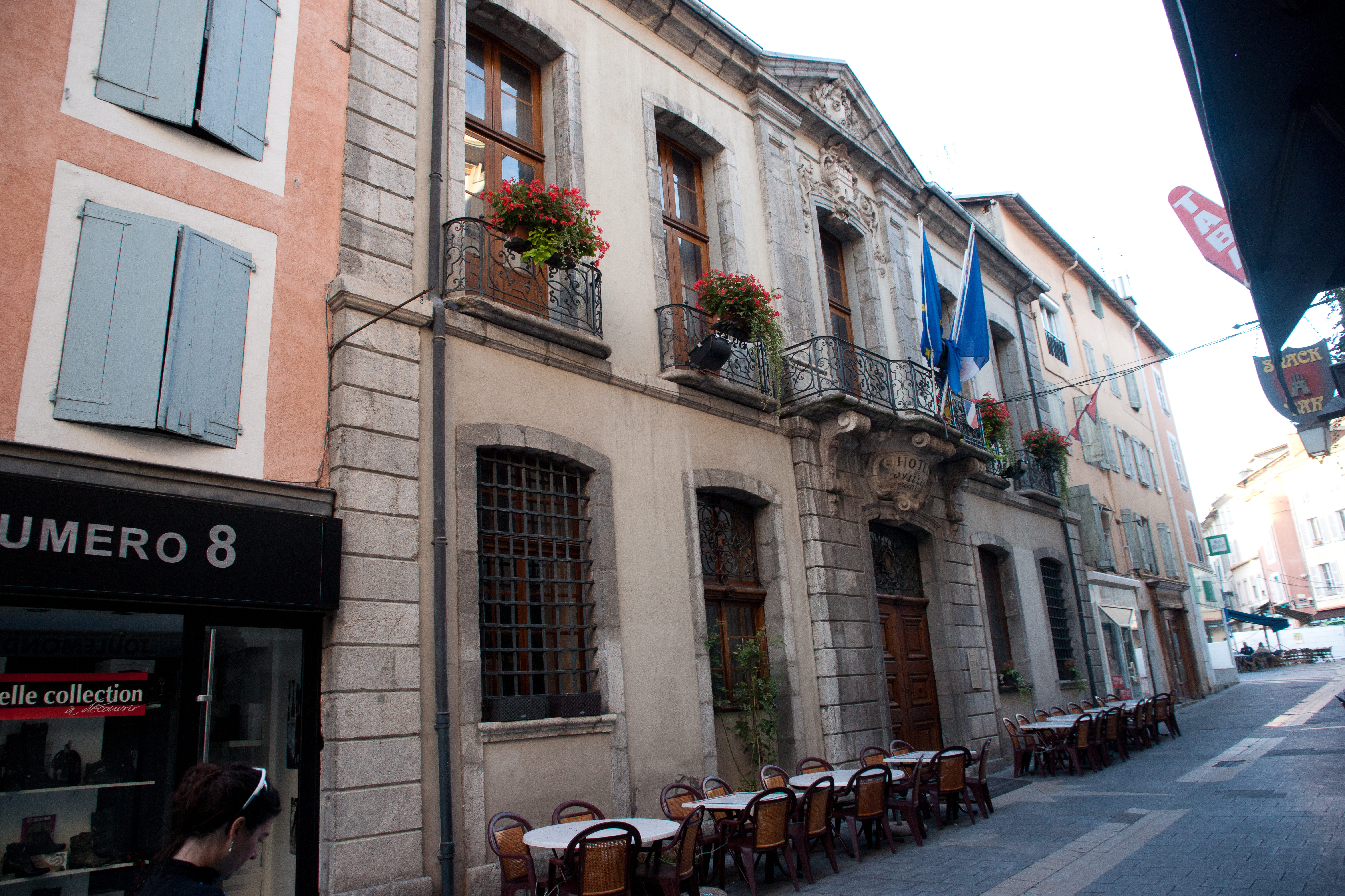 Gap - Hôtel de ville